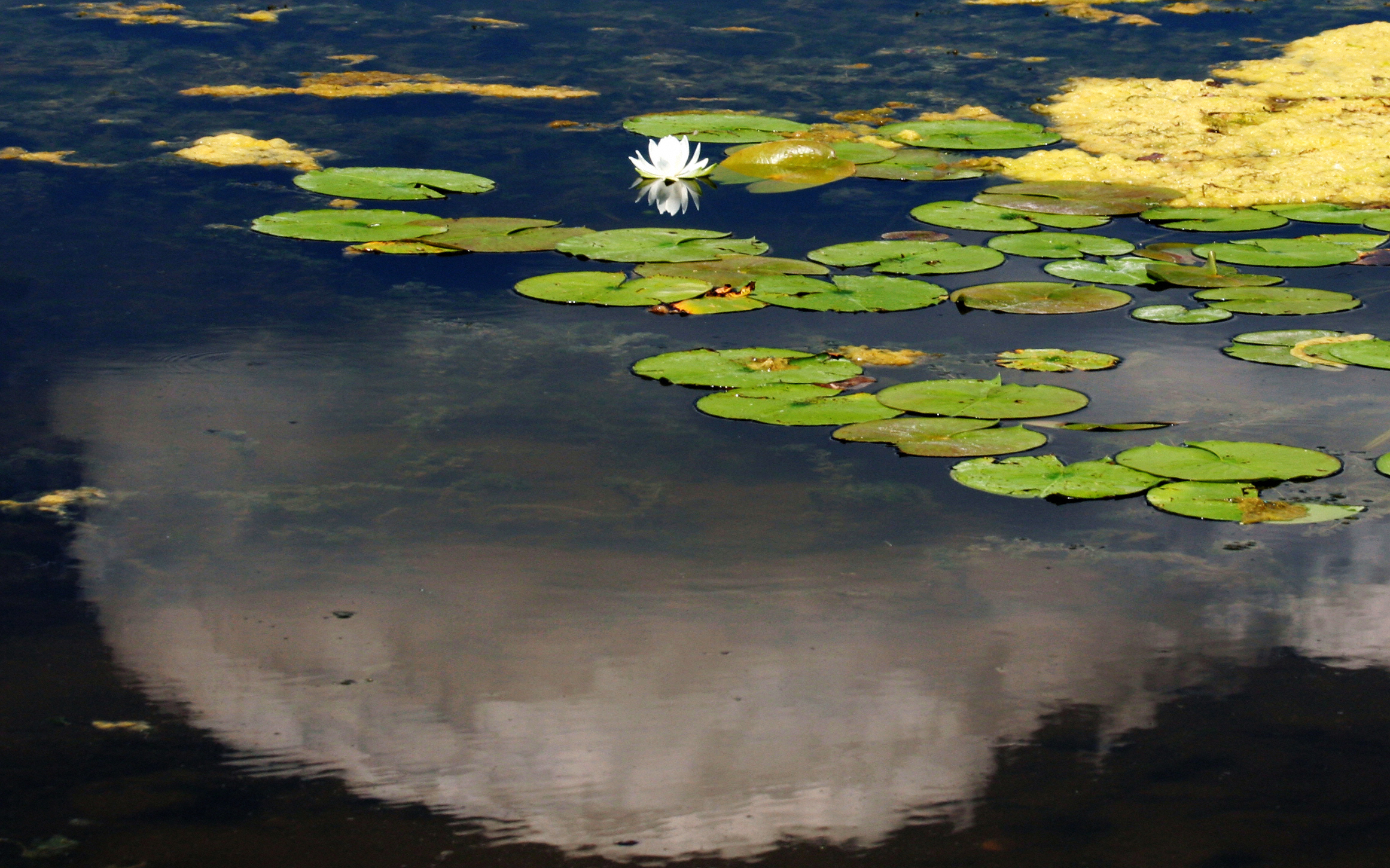 Lake Phalen, Maplewood, MN